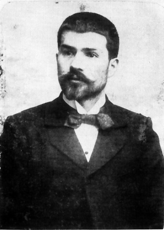 Constantin Brâncuşi in Paris, c. 1905